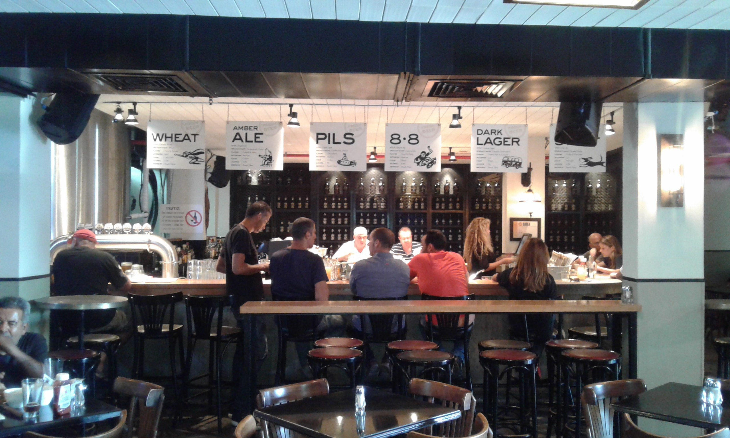 פאב ג'מס בפתח תקווה